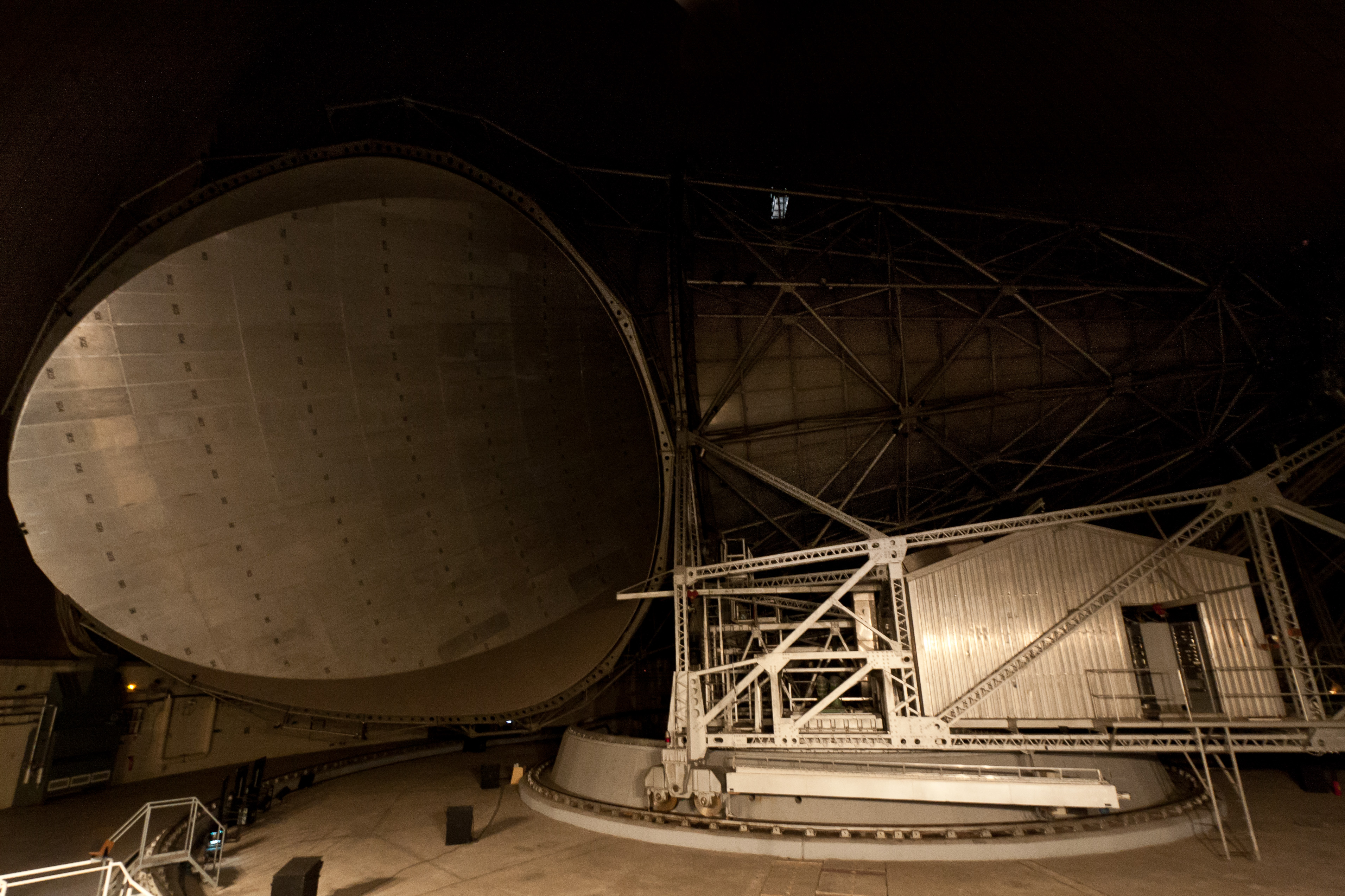 Horn antenna in Pleumeur-bodou, France. This is the same antenna as the Andover's one (Maine, USA), and was used for the first live transmission of television from USA to Europe.